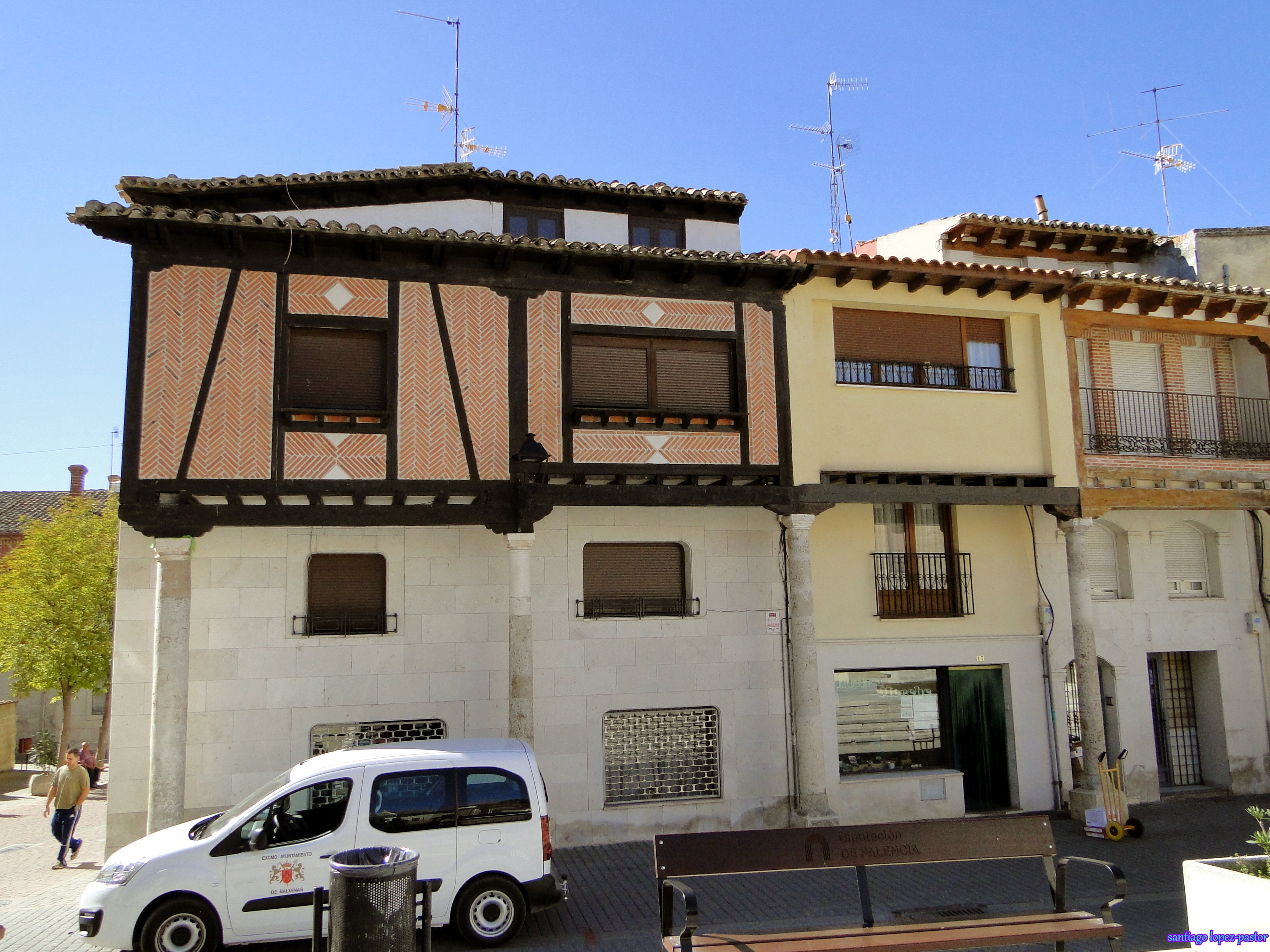 Baltanás